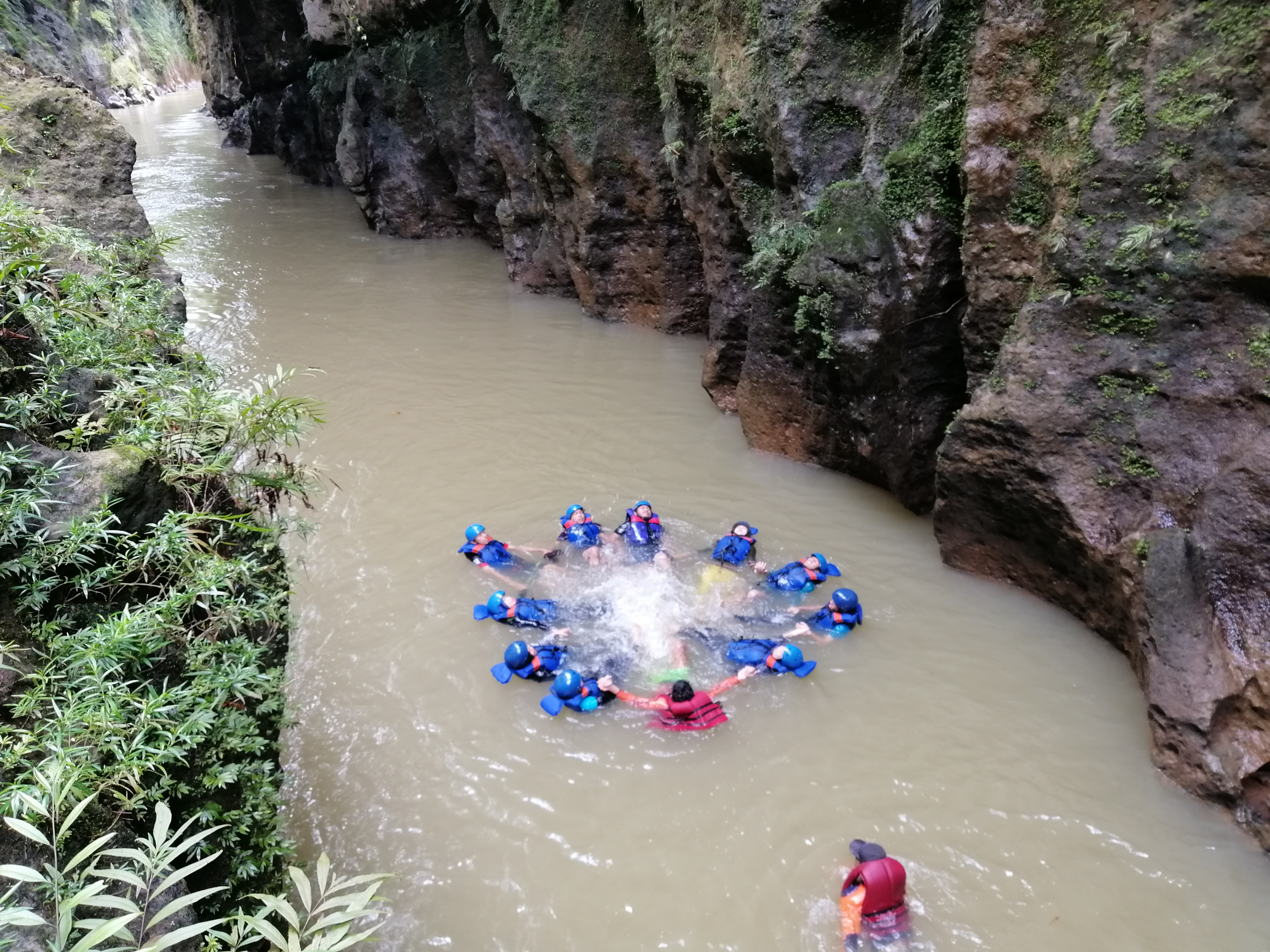 Body Rafting di Sungai Ciwayang, Pangandaran, Indonesia